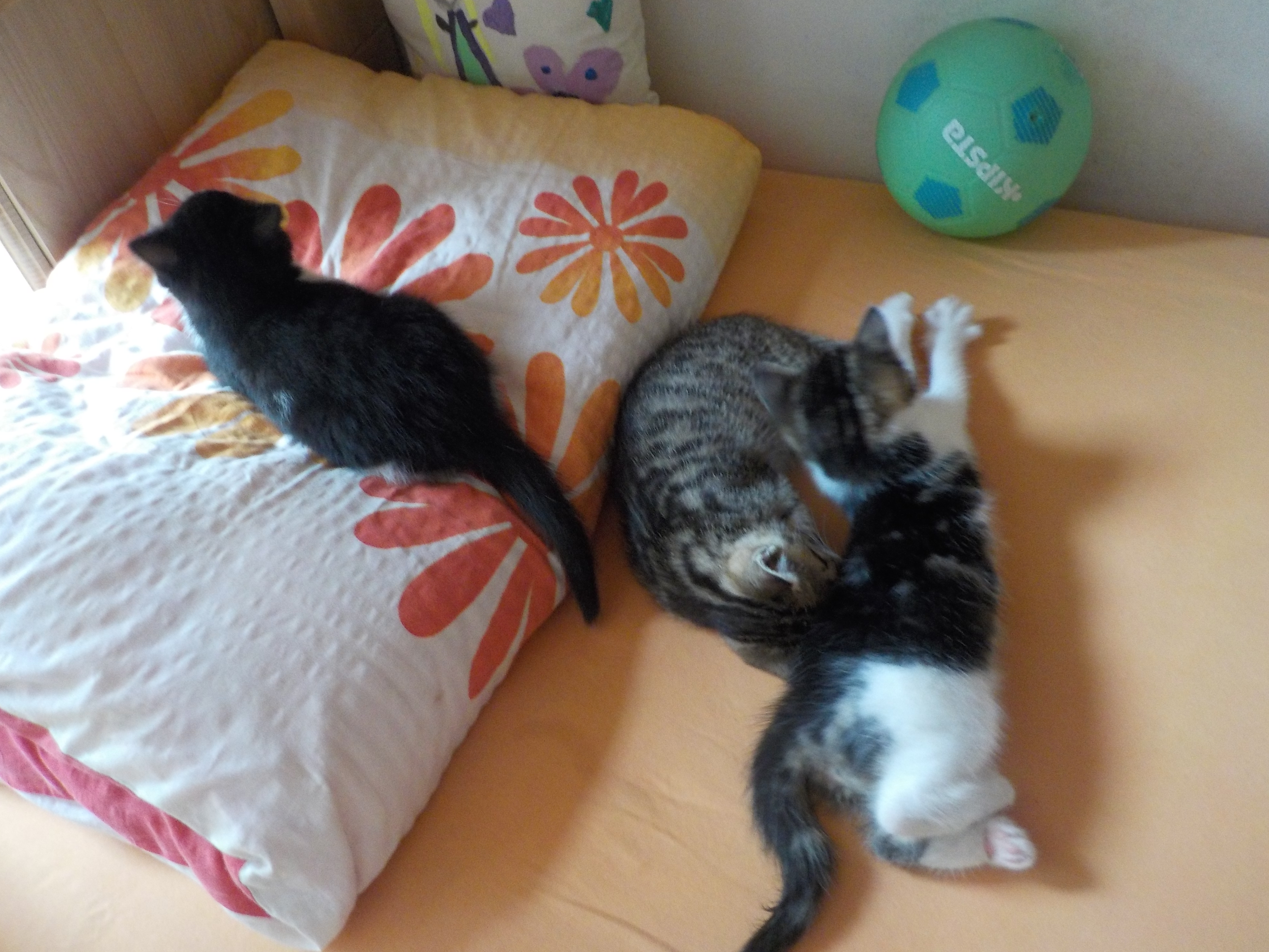 Koťata, která jsou stará téměř 2 měsíce, prozkoumávají byty a jí i granule